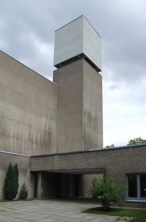 Berlin Kreuzberg, Alexandrinenstraße, Gemeindezentrum und Kirche St. Agnes, Entwurf Werner Düttmann